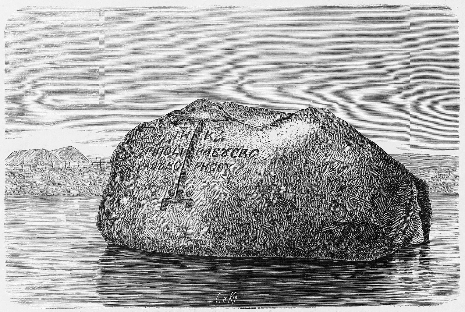 Первый Борисов камень в Дисне.